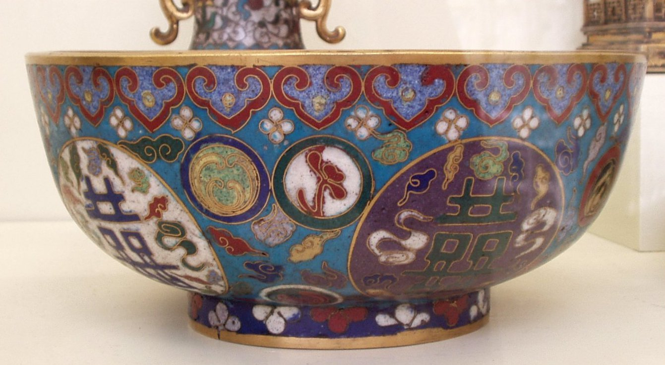 Ming dynasty Cloisonne bowl